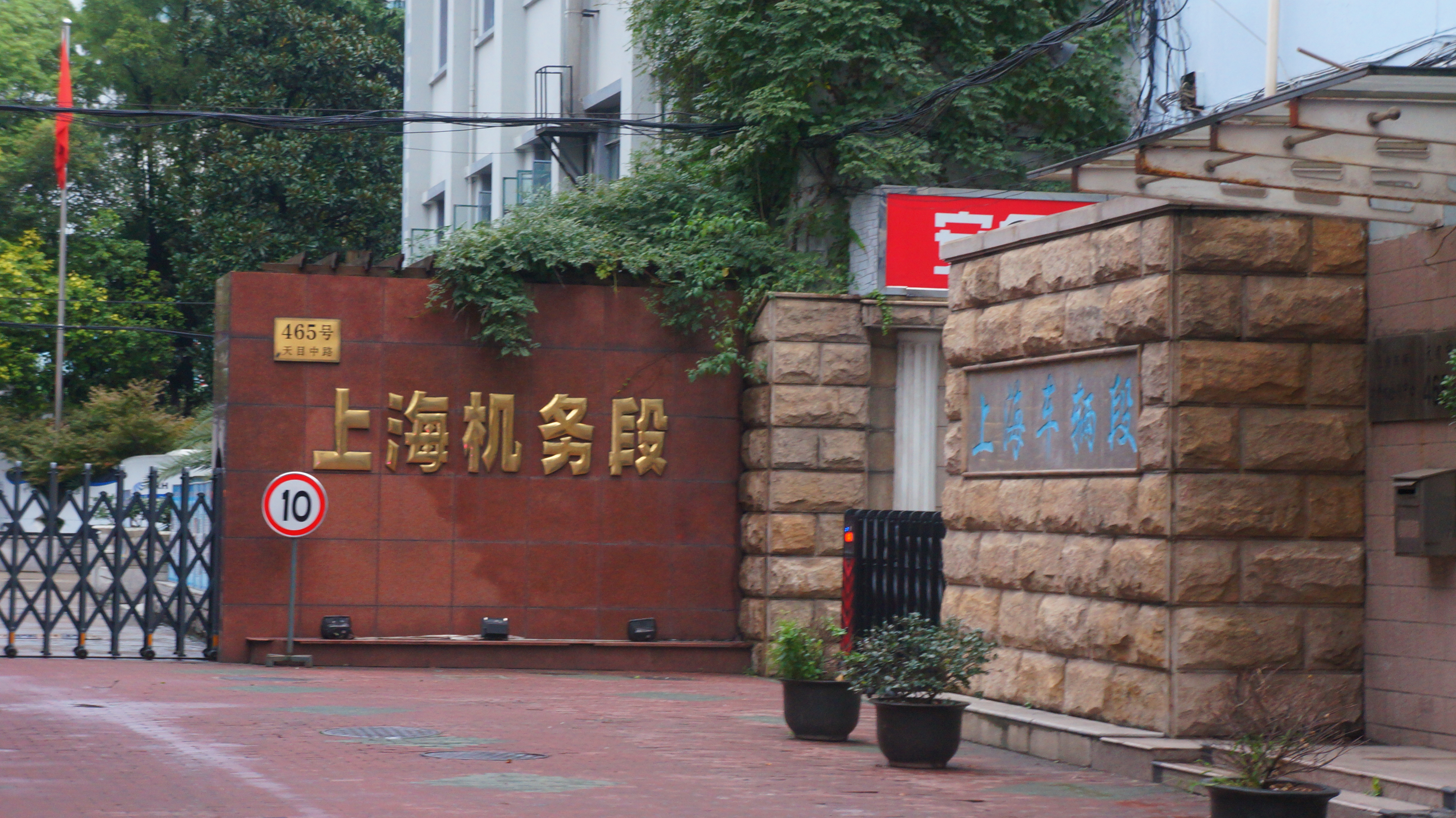 201510上海机务段上海车辆段